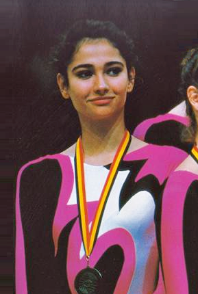 Montse Martín en el podio del Mundial de Bruselas en 1992.